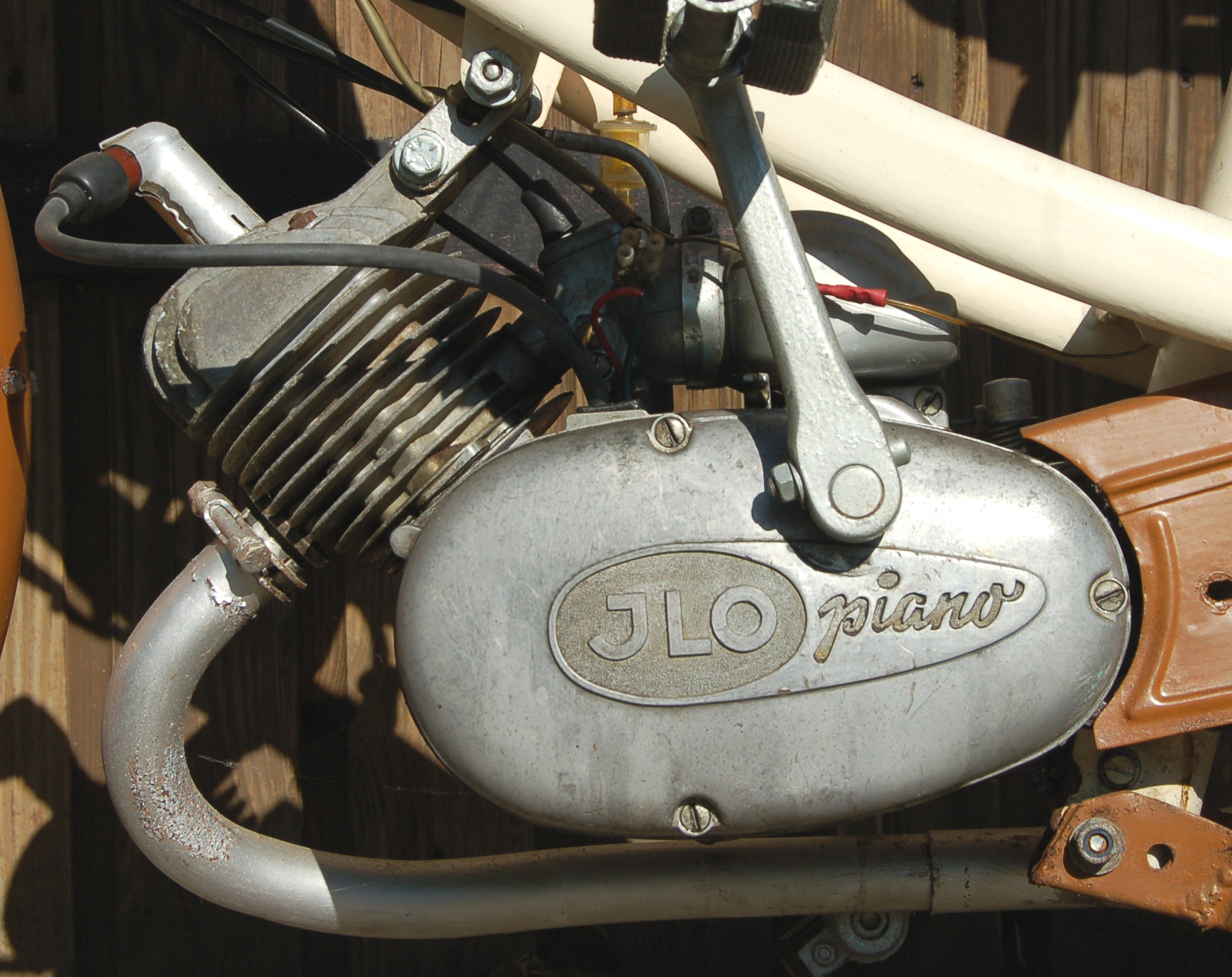 ILO Piano Motor, 49 ccm 1,25 PS, Baujahr 1958.